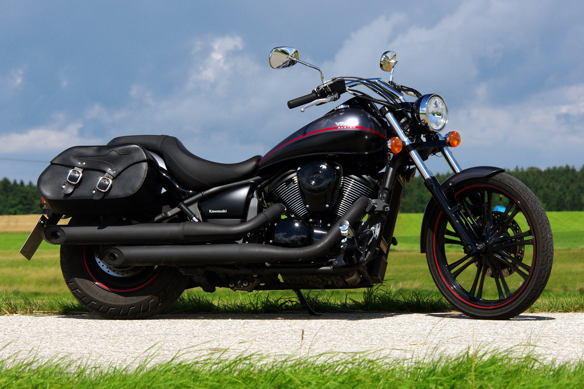 Kawasaki VN 900 Custom (48PS) Bj. 2014